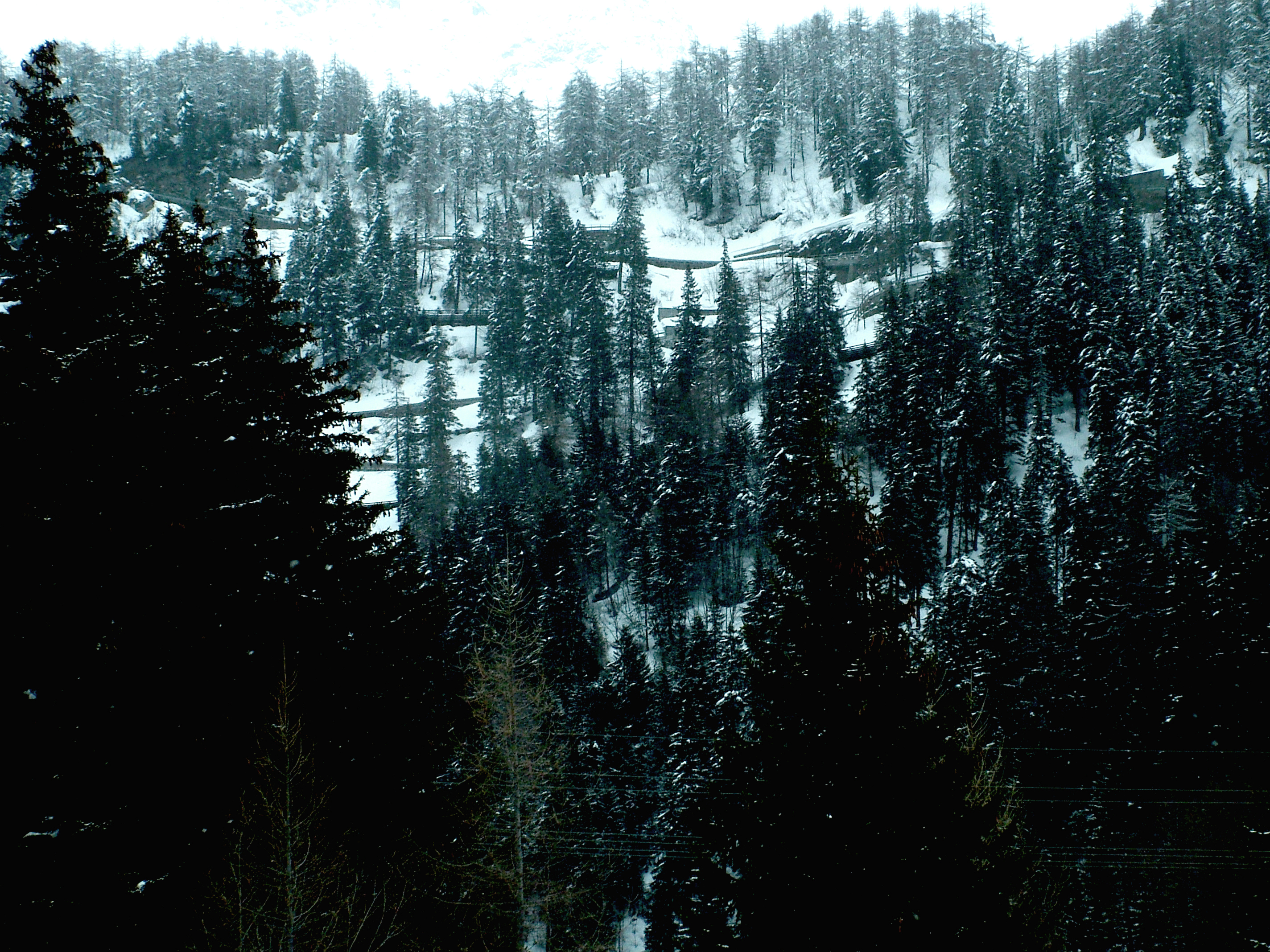 A téli Maloja-hágó a déli rámpaútról (Bergün-völgy, Svájc)